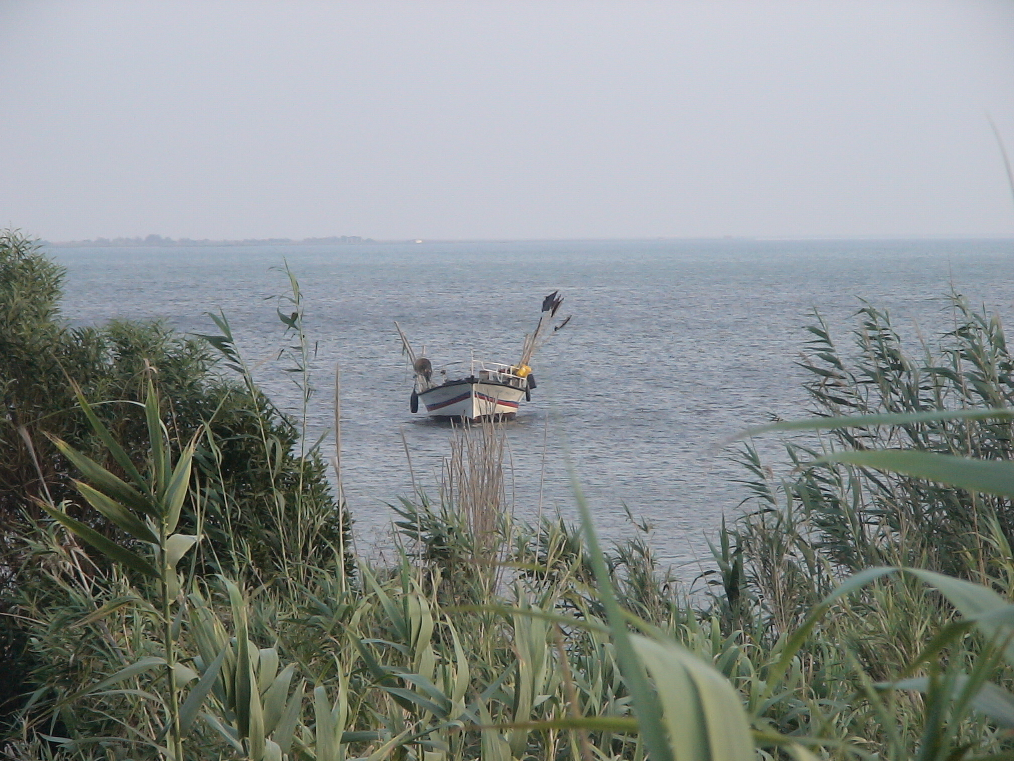 Barque de peche dans la lagune de Ghar El Melh